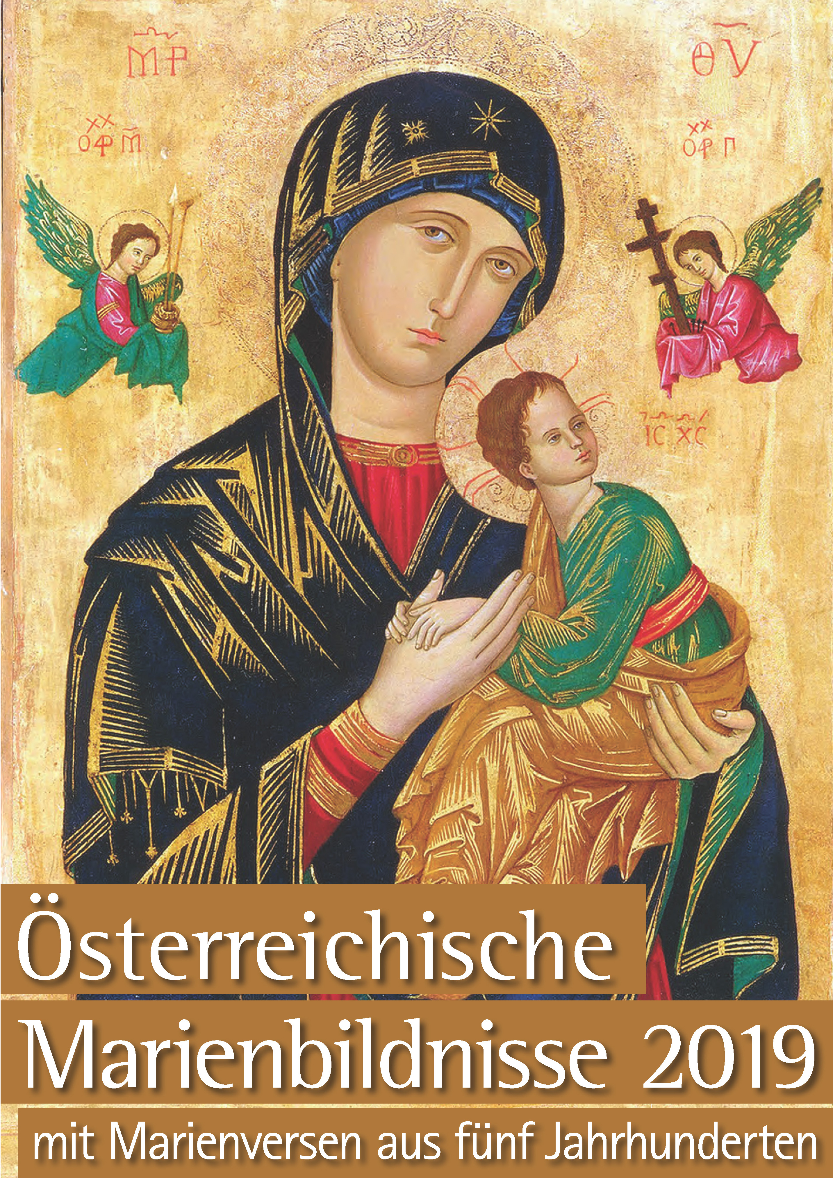 Titelbild des Marienkalenders "Österreichische Marienbildnisse 2019"